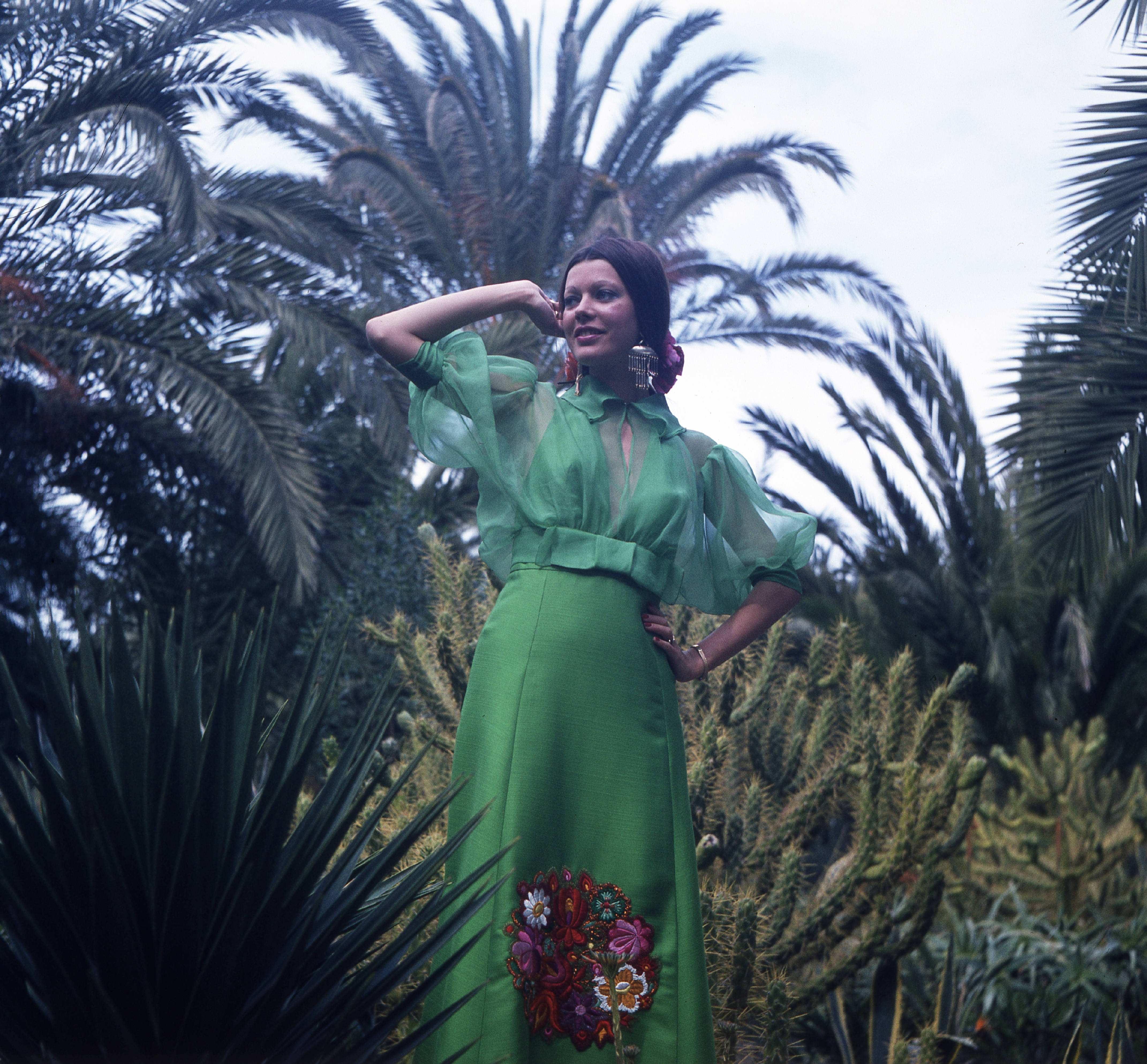 Felkai Anikó manöken. Tags: colorful, fashion, palm tree Title: Felkai Anikó manöken.